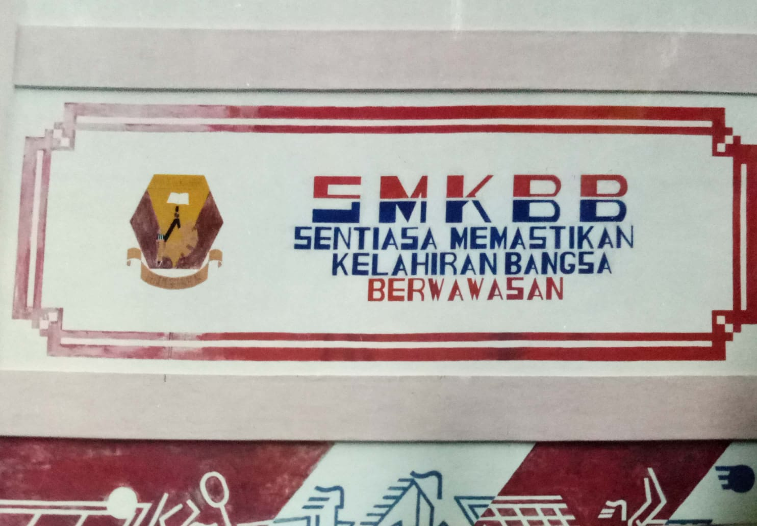 Visi Sekolah